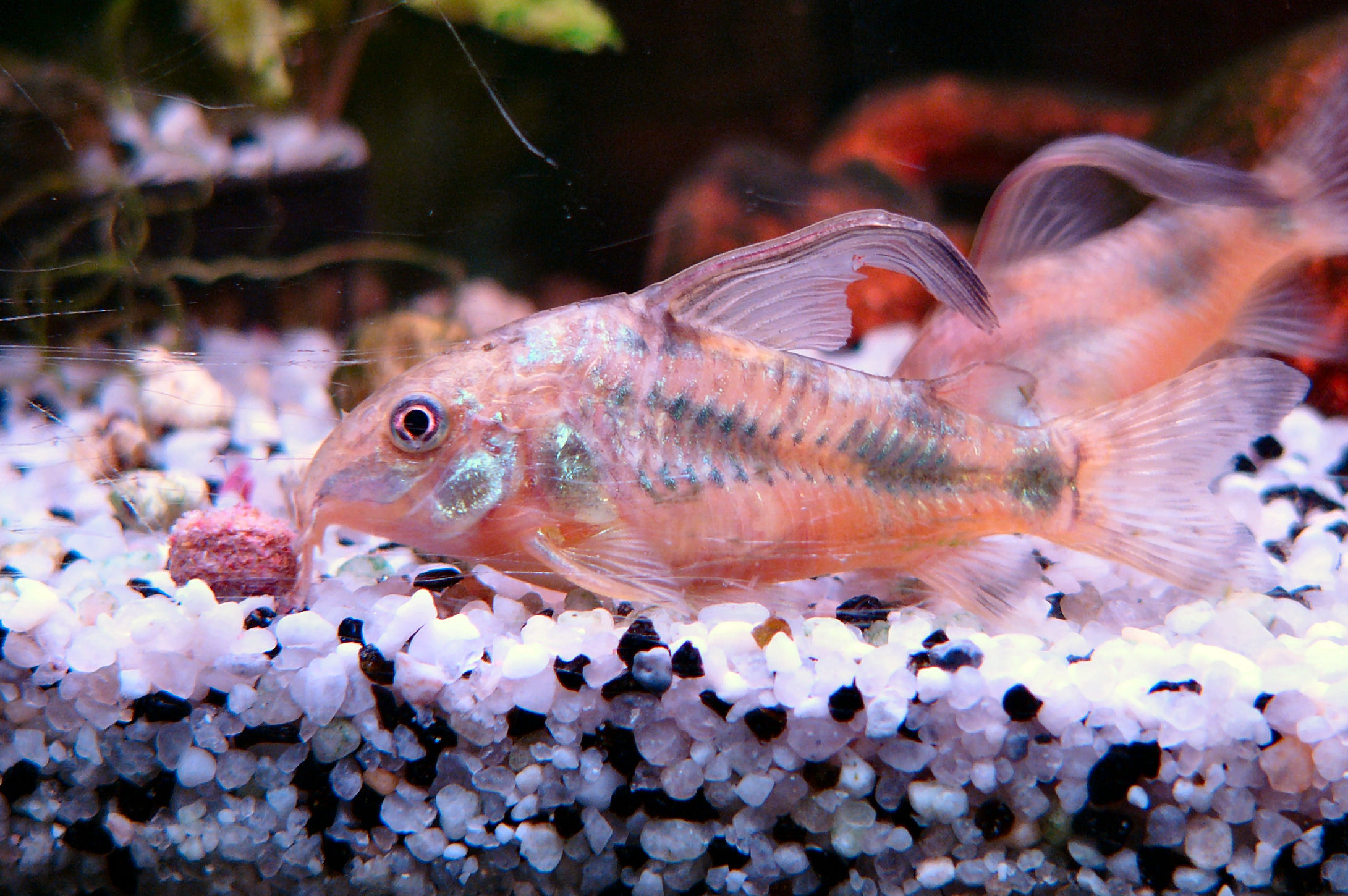 cory poivré